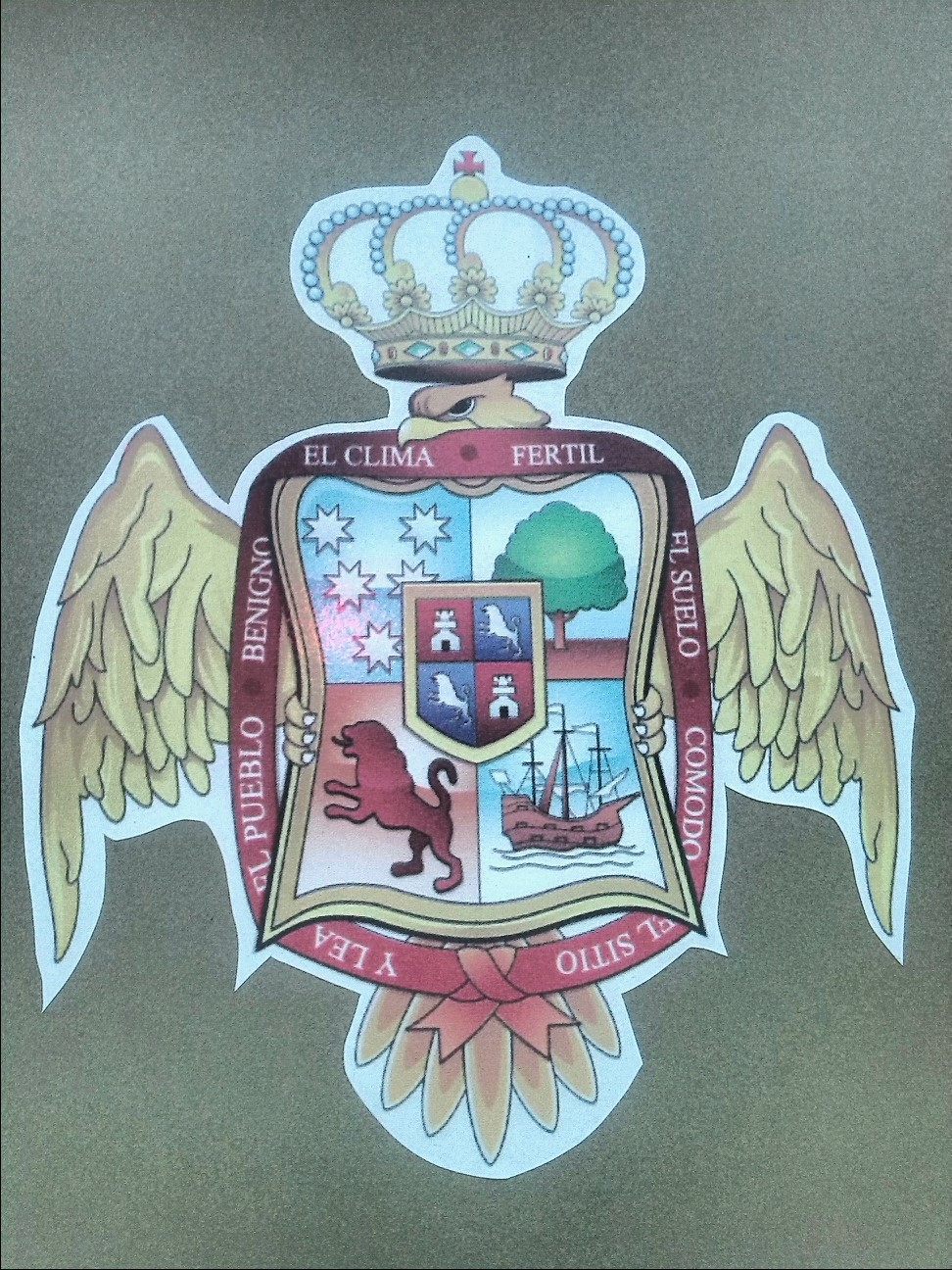 Escudo de Orizaba, Veracruz